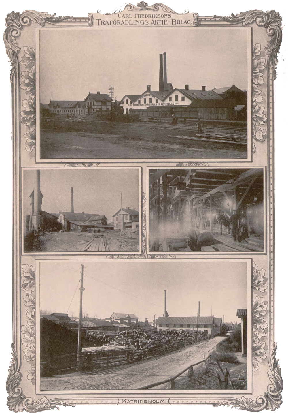 Carl Fredriksons Träförädlings Aktie-Bolag Katrineholm